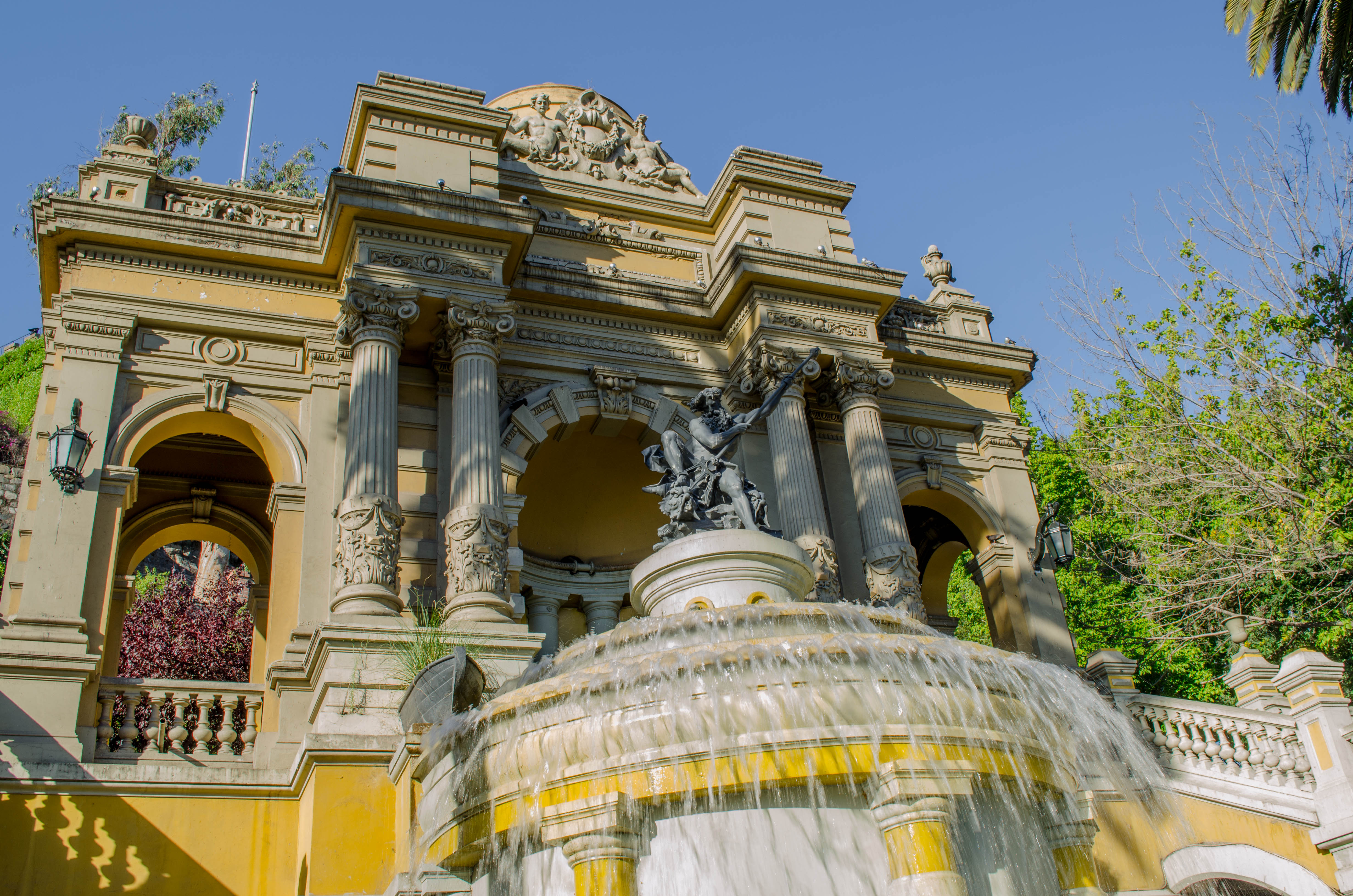 Neptune fountain